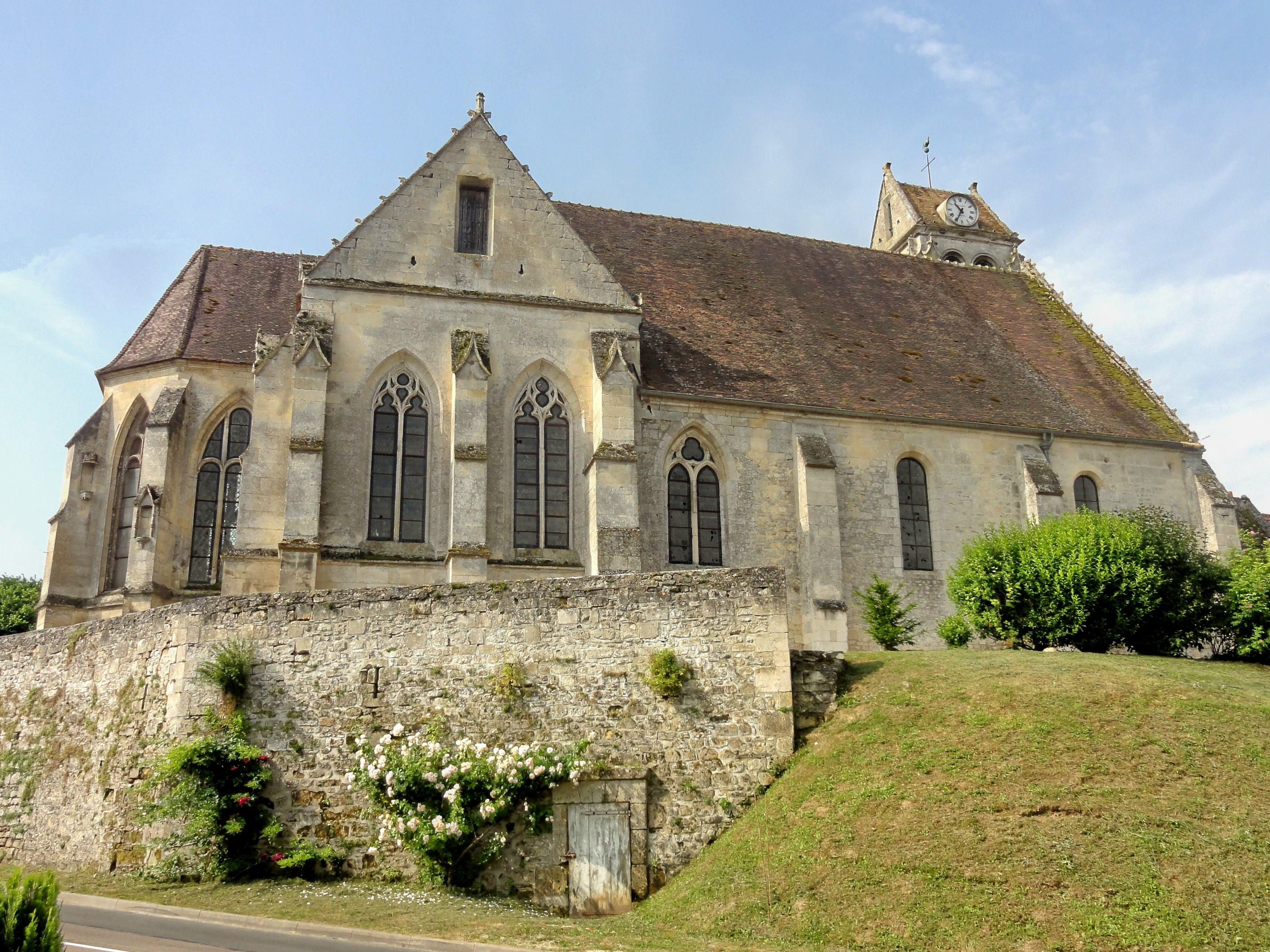 Vue depuis le nord.